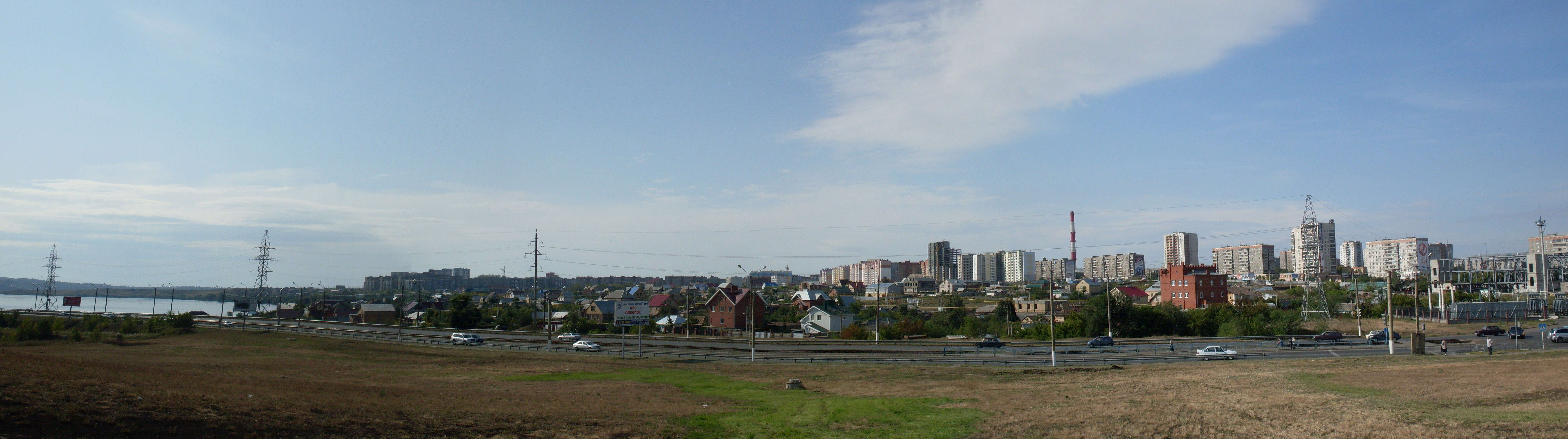 Панорама города Магнитогорск